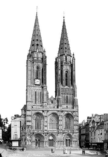 Façade ouest.